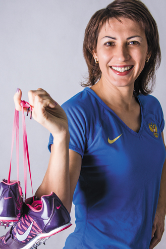 Олимпийская чемпионка, многократная чемпионка мира и Европы. Заслуженный мастер спорта России, вице-президент Всероссийской федерации легкой атлетики. Фотография из серии «Лица эстафеты».